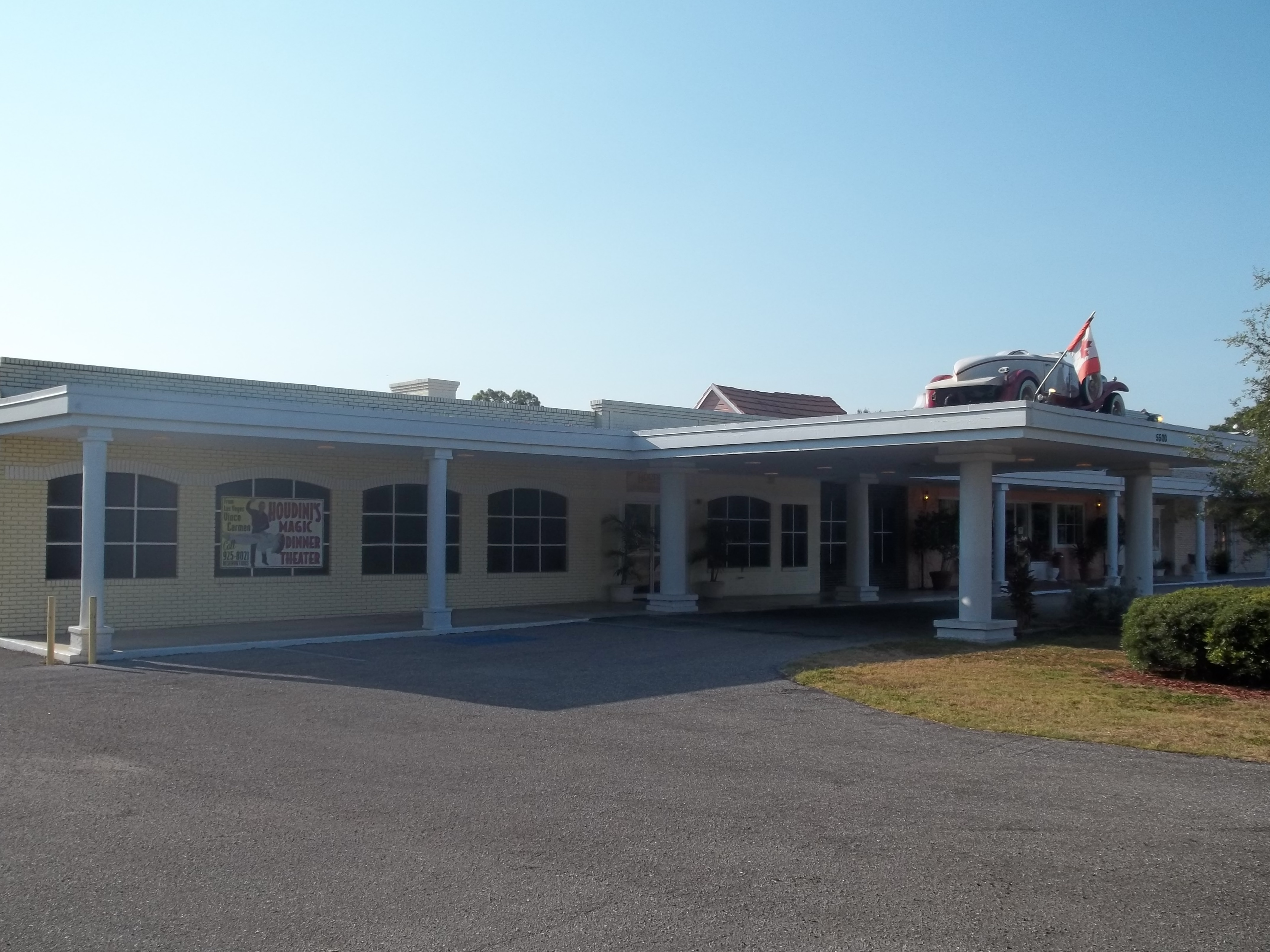 Sarasota, Florida: Sarasota Classic Car Museum